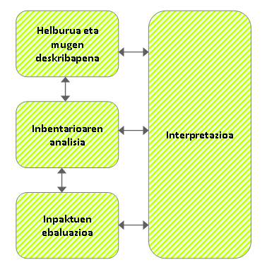 bizi zikloaren analisia